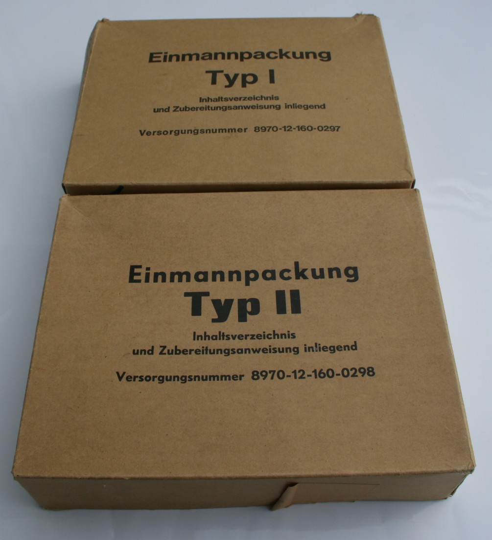 EPA von 1981